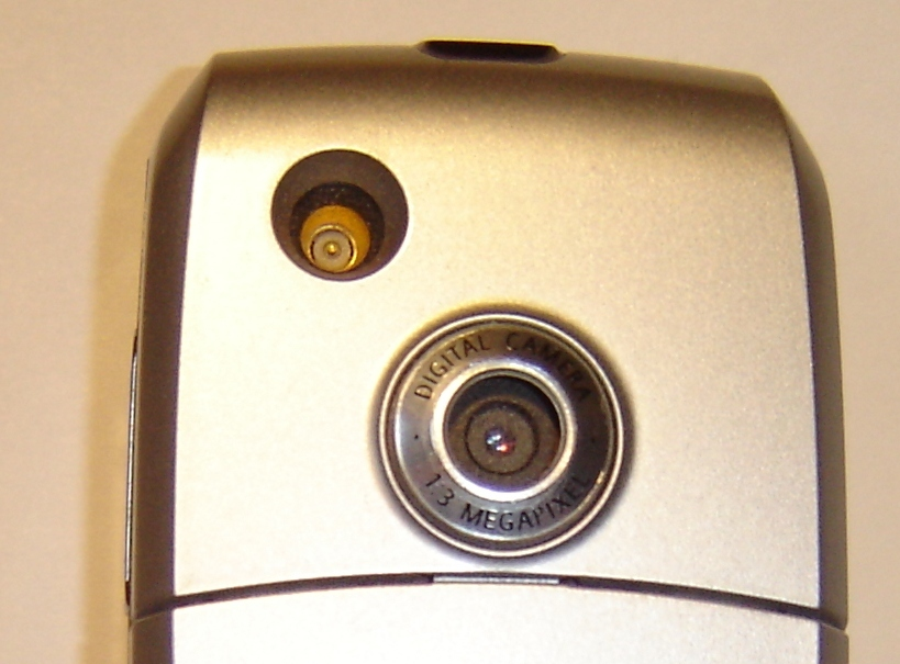 Siemens S65, Fotohandy mit integrierter Kamera